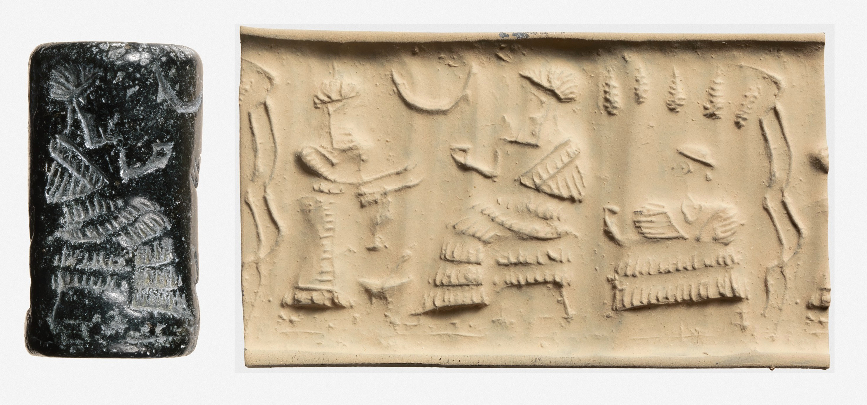 Elamite; Cylinder seal; Stone-Cylinder Seals